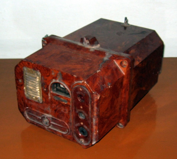 Automatic methane defence device from the complete set of AMT-3 – Апаратура автоматичного газового захисту і автоматичного централізованого контролю метану з комплекту АМТ-3